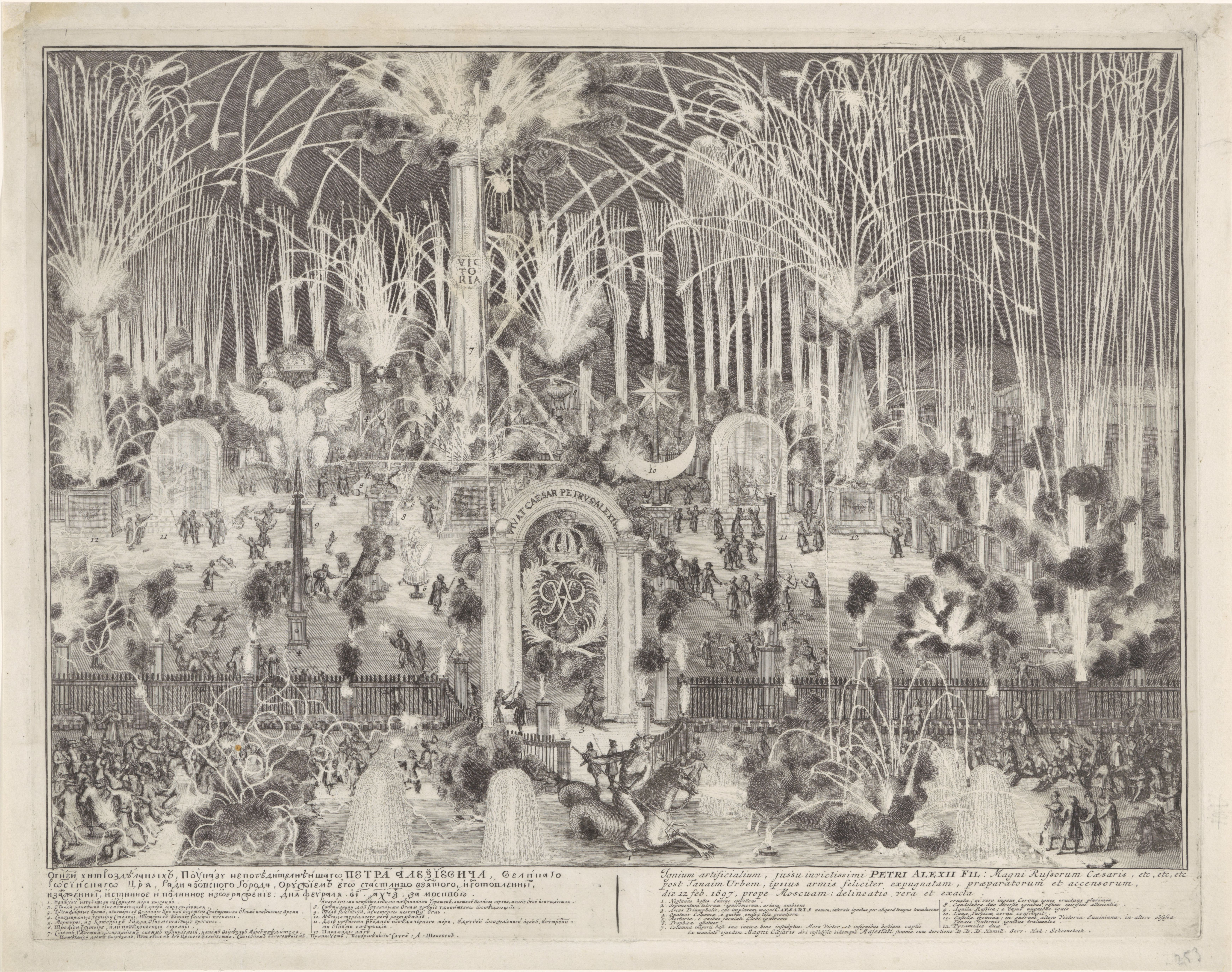 Офорт Адриана Шхонебека, относящийся к 1697—1699 гг., хранящийся в Амстердамском музее. На офорте изображен фейерверк 12 февраля 1697 года, устроенный по Указу Петра I и посвященный взятию Азова. Офорт снабжен цифровыми обозначениями и подписями на русском и латинском языках.